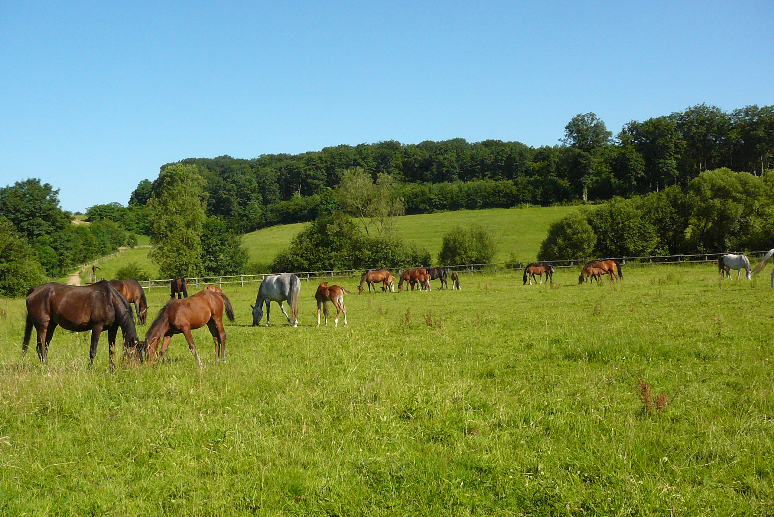 Elevage de chevaux arabe shagya